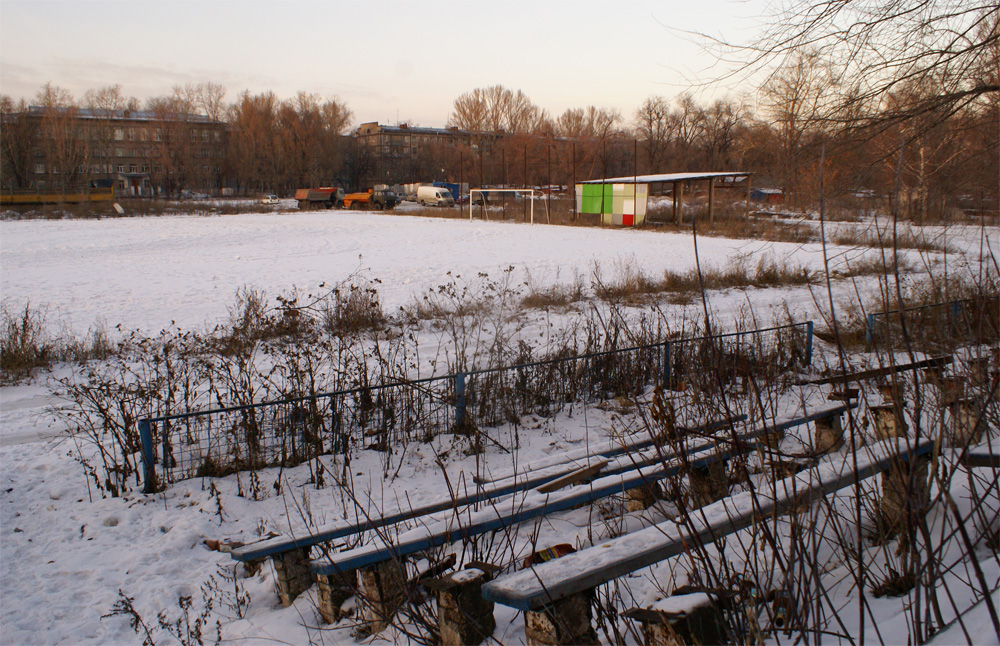 Стадион «Торпедо-9». (Самара, улица Красных Коммунаров, 20а). Бывший стадион ГПЗ-9.